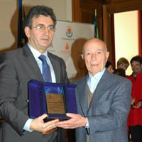 Il prof.Lisi riceve il "Premio Santa Barbara"- Città di Rieti